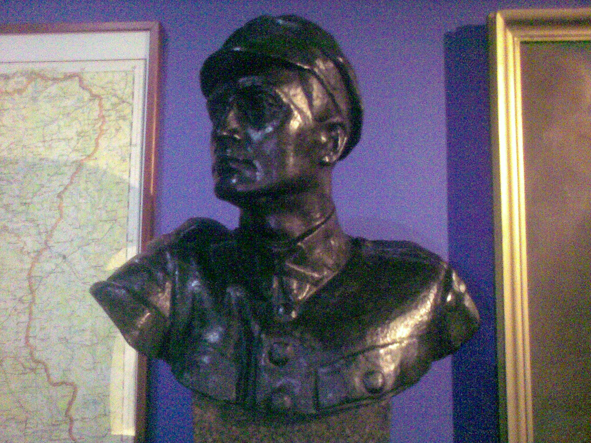 Edward Wittig - Popiersie pułkownika Leopolda Lisa-Kuli, ze zbiorów Muzeum Wojska Polskiego w Warszawie